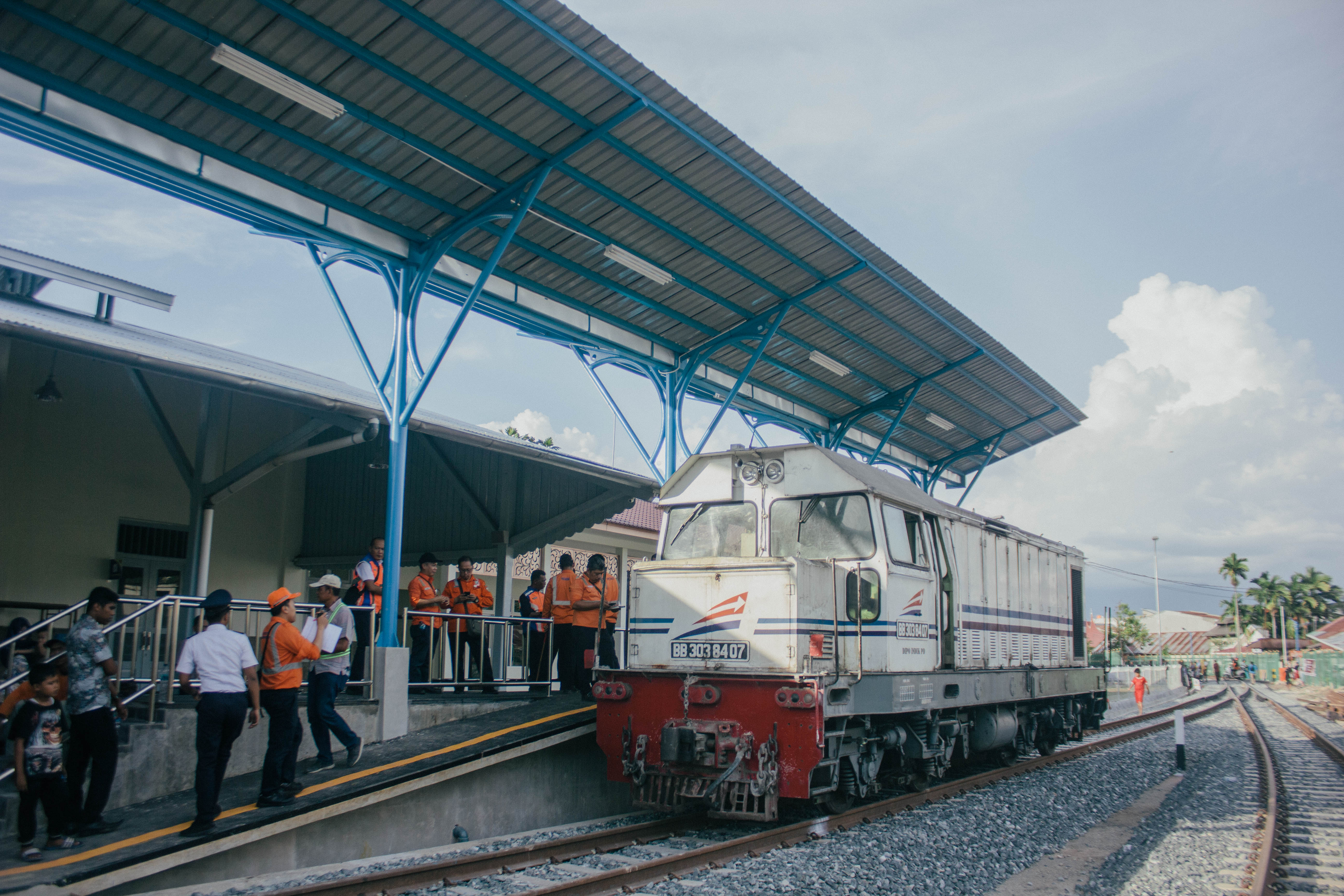 Stasiun Pulau Aie beberapa saat setelah uji coba jalur kereta api Padang-Pulau Aie, tampak lokomotif BB 303 84 07 terparkir di stasiun ini.